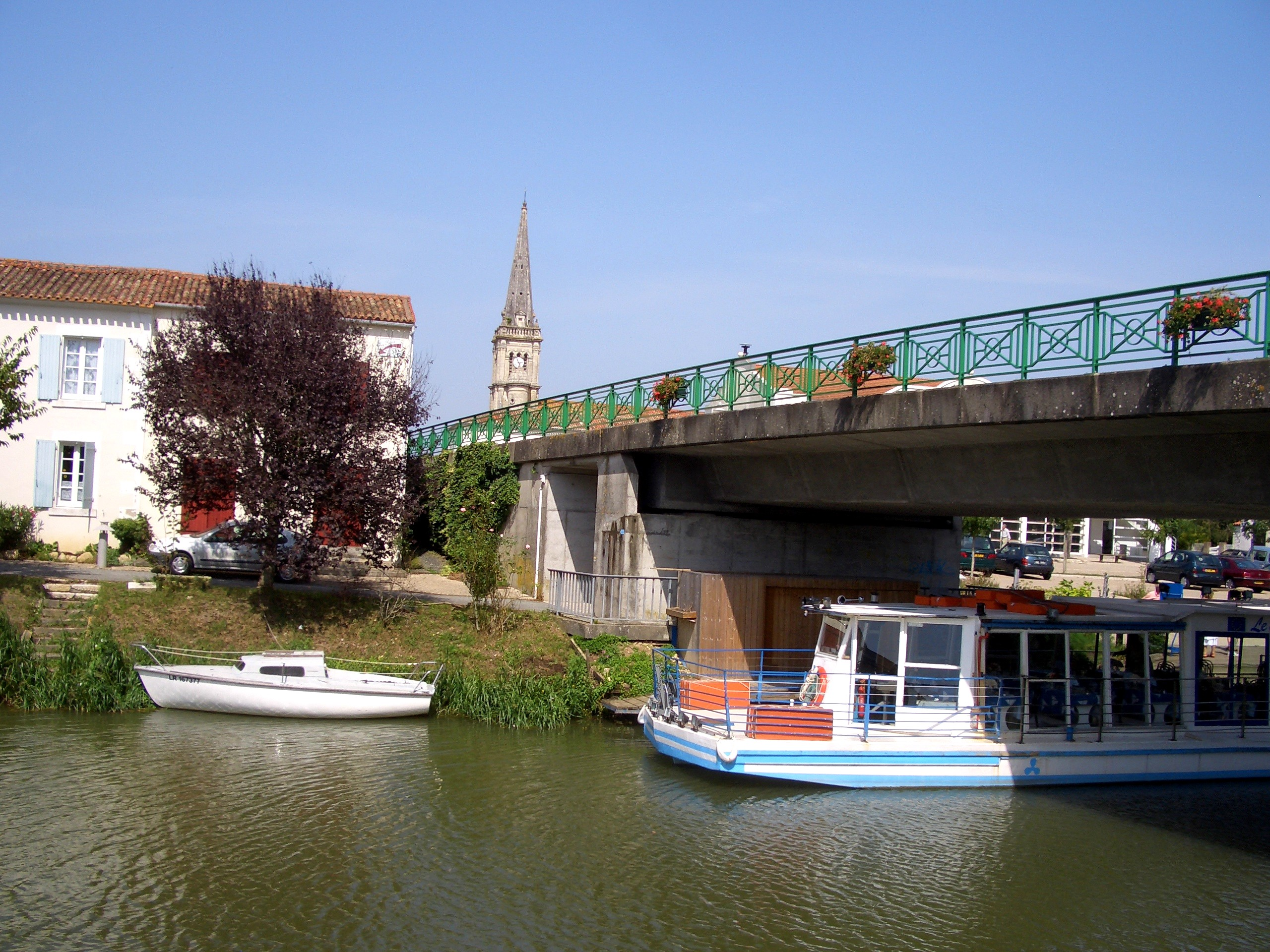 Damvix, panorama fluviale